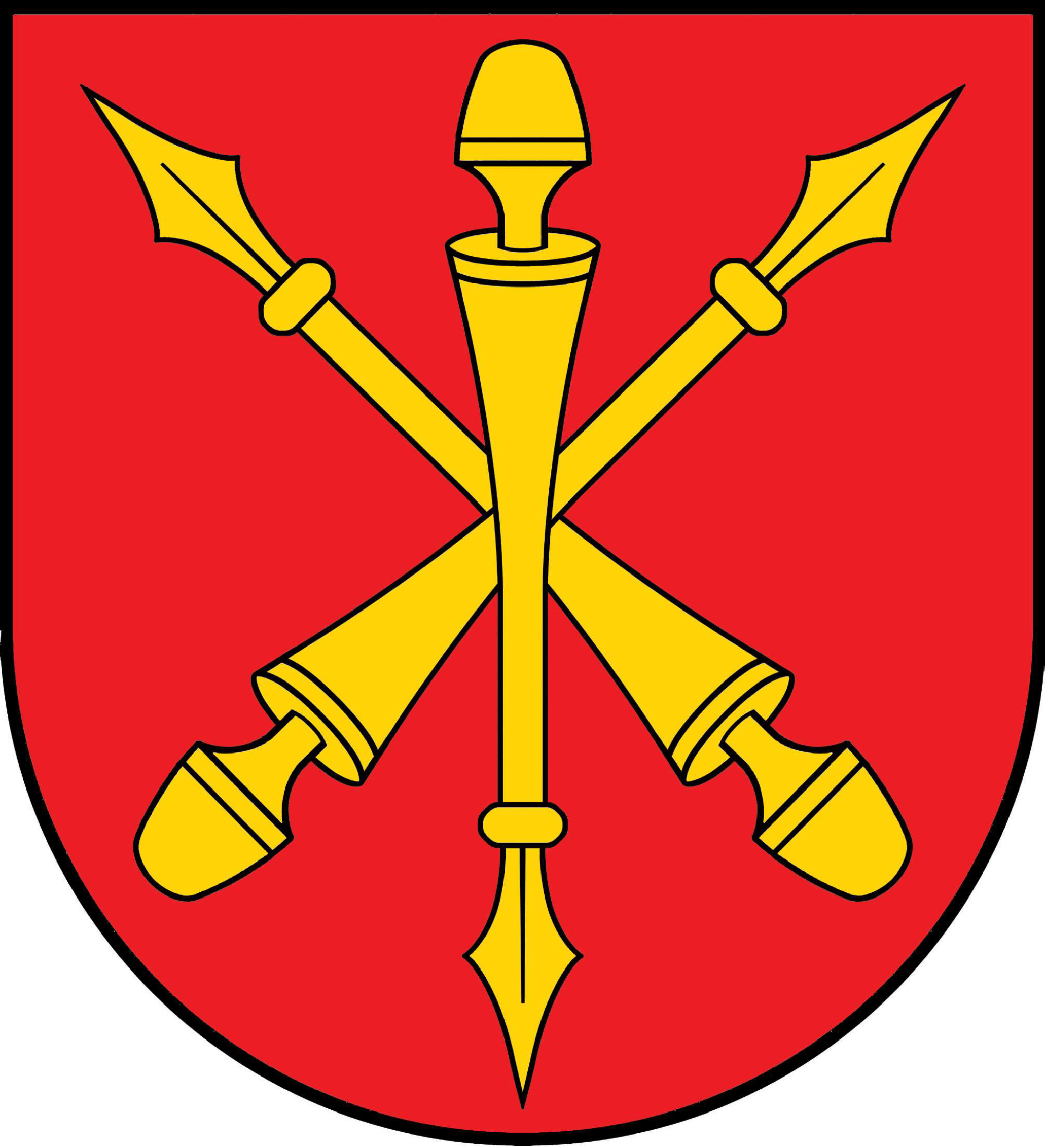 Herb gminy Stary Zamość.